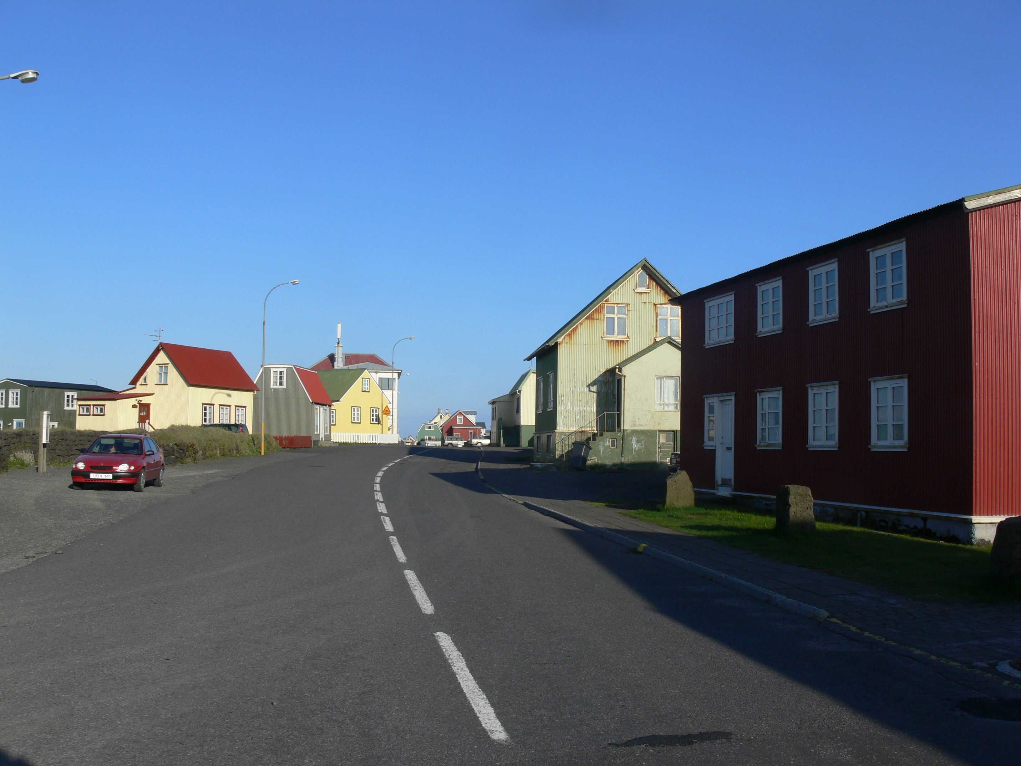 Hauptstraße von Eyrarbakki.